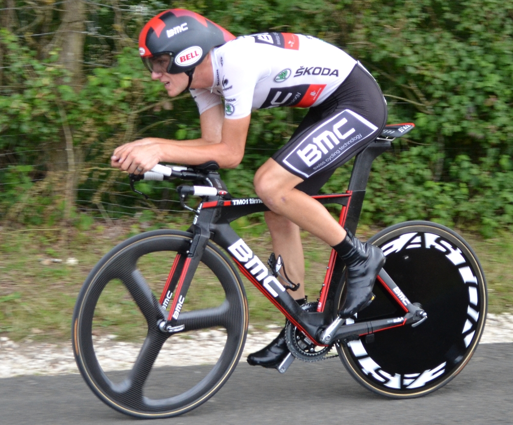 Tejay Van Garderen TDF2012